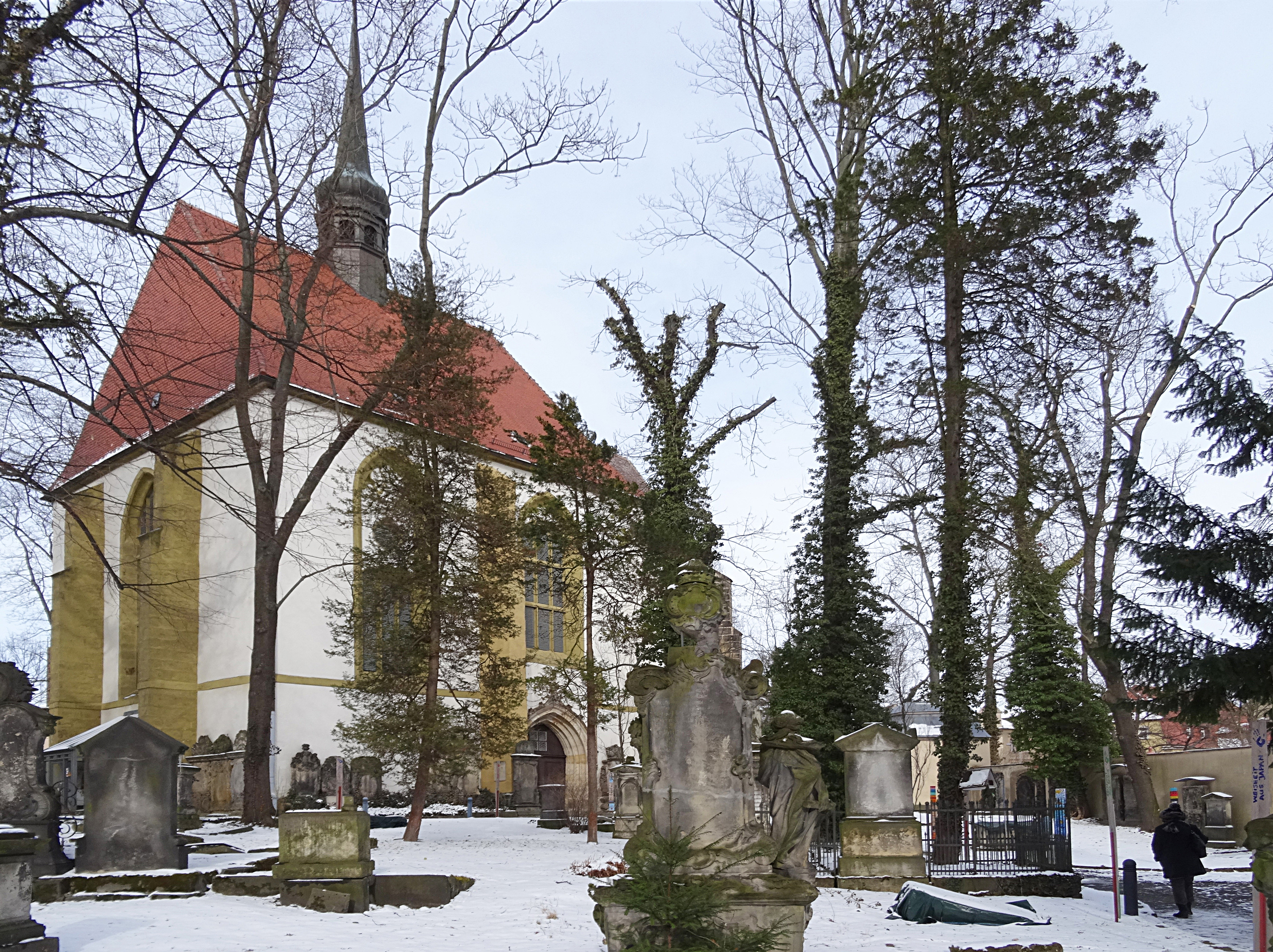 Kirche zum Heiligen Kreuz (Zittau)